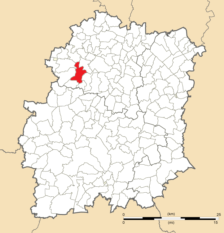 Carte de position de Briis-sous-Forges en Essonne (91)